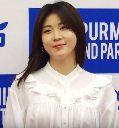 디스패치 구독 클릭!